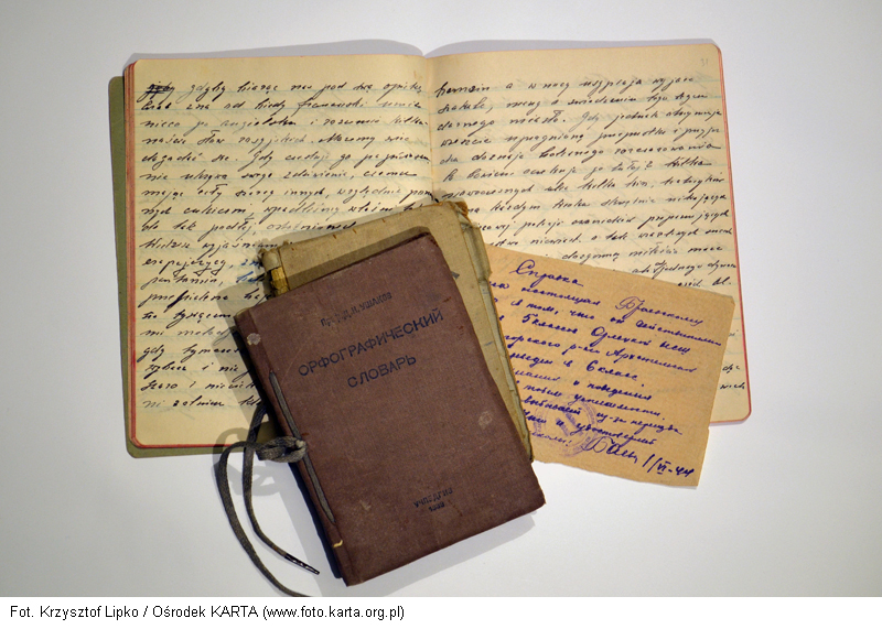 Fot. Krzysztof Lipko/Ośrodek KARTA